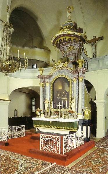 Der Kanzelalter stammt von Peter Bandenthaler, das Retabelbild ist ein Werk von Adam Friedrich Oeser; auf der Empore das Kruzifix "Consummatum est!" ("Es ist vollbracht!") eines der Hauptwerke von Johann Fadrusz (1858 - 1903).